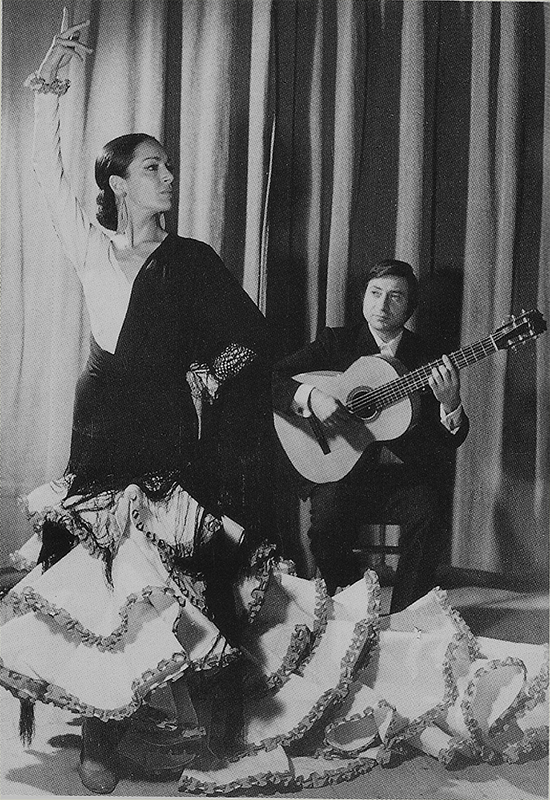 Ana Mercedes y andrés Batista